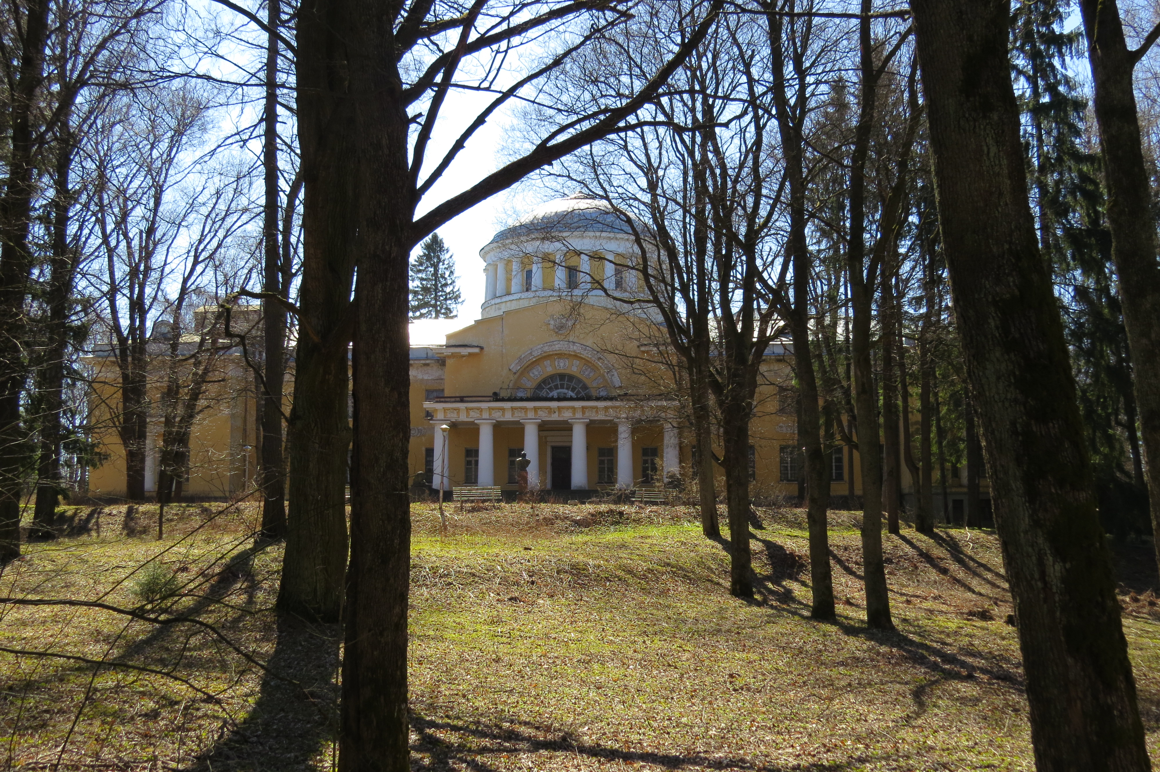 Большой дворец: Шуваловский парк, Парголово, Выборгский район, Санкт-Петербург